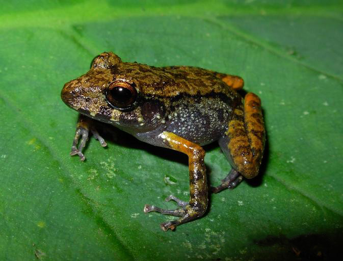 Pristimantis gaigeae